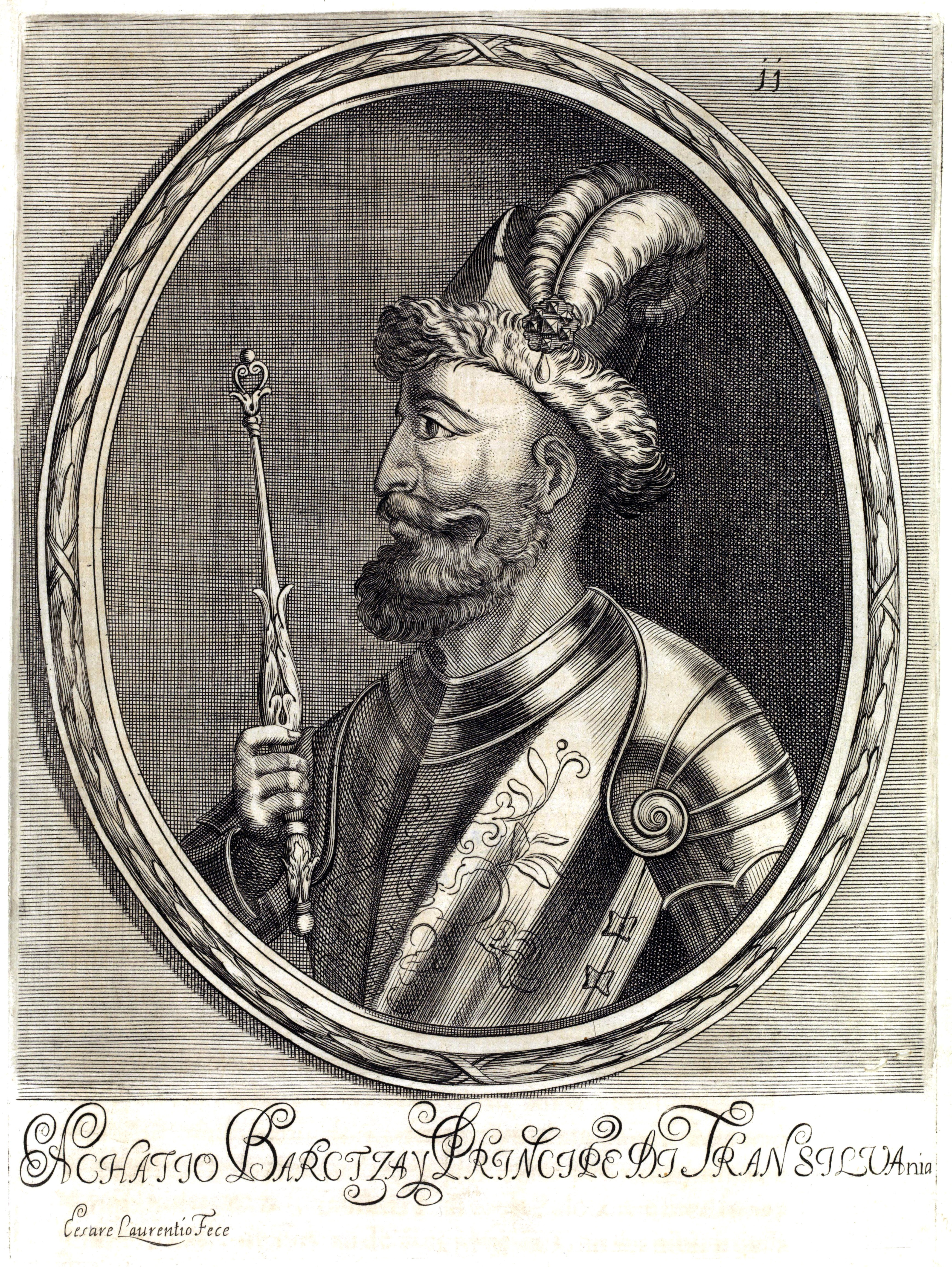 Ákos Barcsay (Achatio Barctzay), Prince of Transylvania